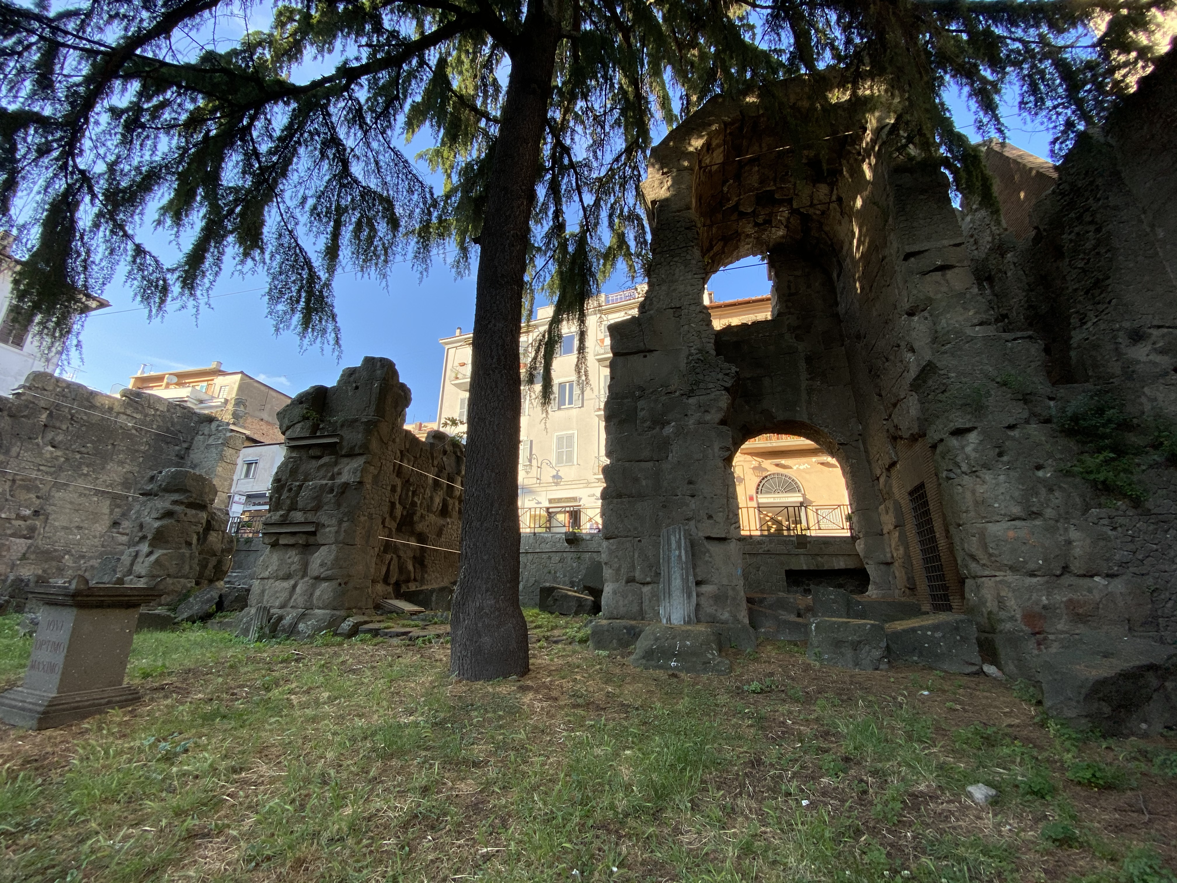 Porta Pretoria ad Albano Laziale